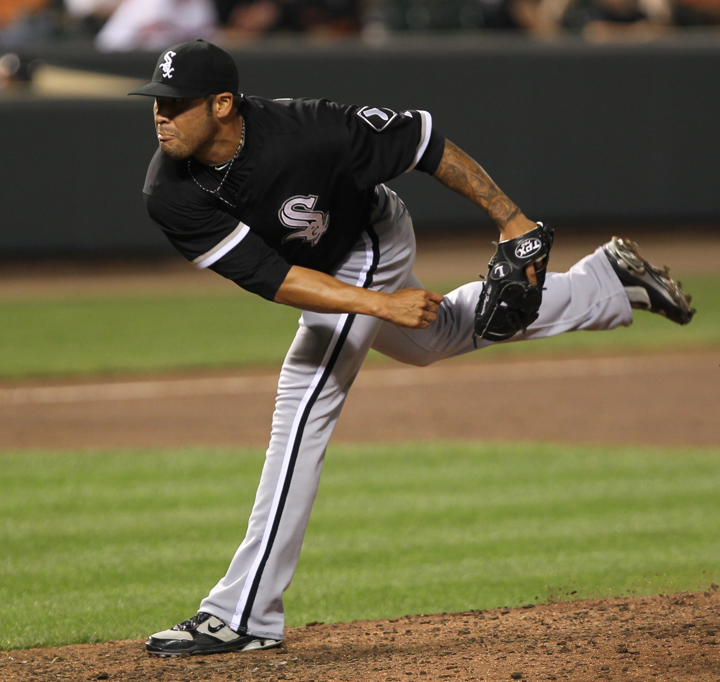 Sergio Santos